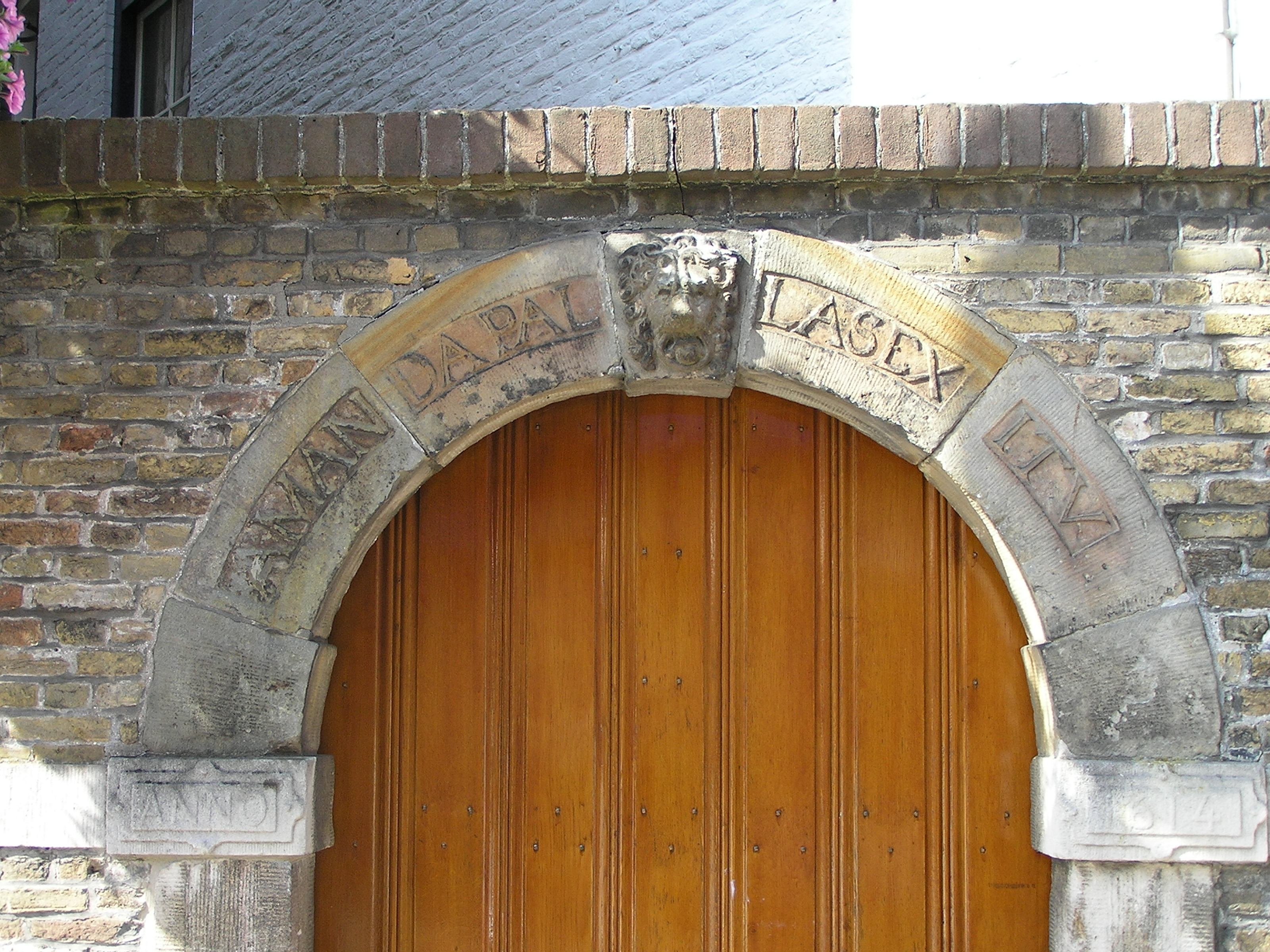 Latijnse poort, Kreukelmarkt (tussen nr. 7 en 9), Goes